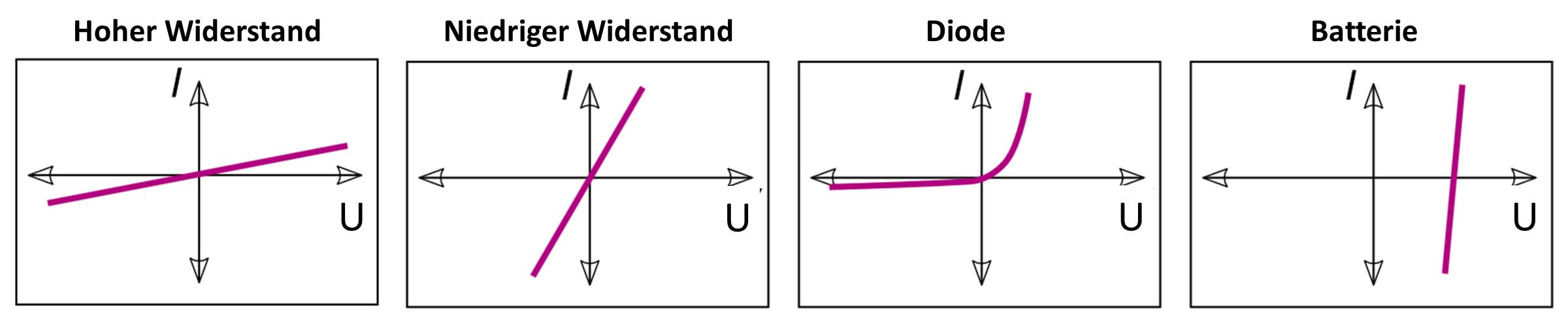 Strom-Spannungskennlinie vier einfacher Bauteile: ein hochohmiger Widerstand, ein niederohmiger Widerstand, eine ideale PN Diode, eine Batterie mit Innenwiderstand. Die horizontale Achse ist der Spannungsabfall U, die senkrechte Achse ist der Strom I.